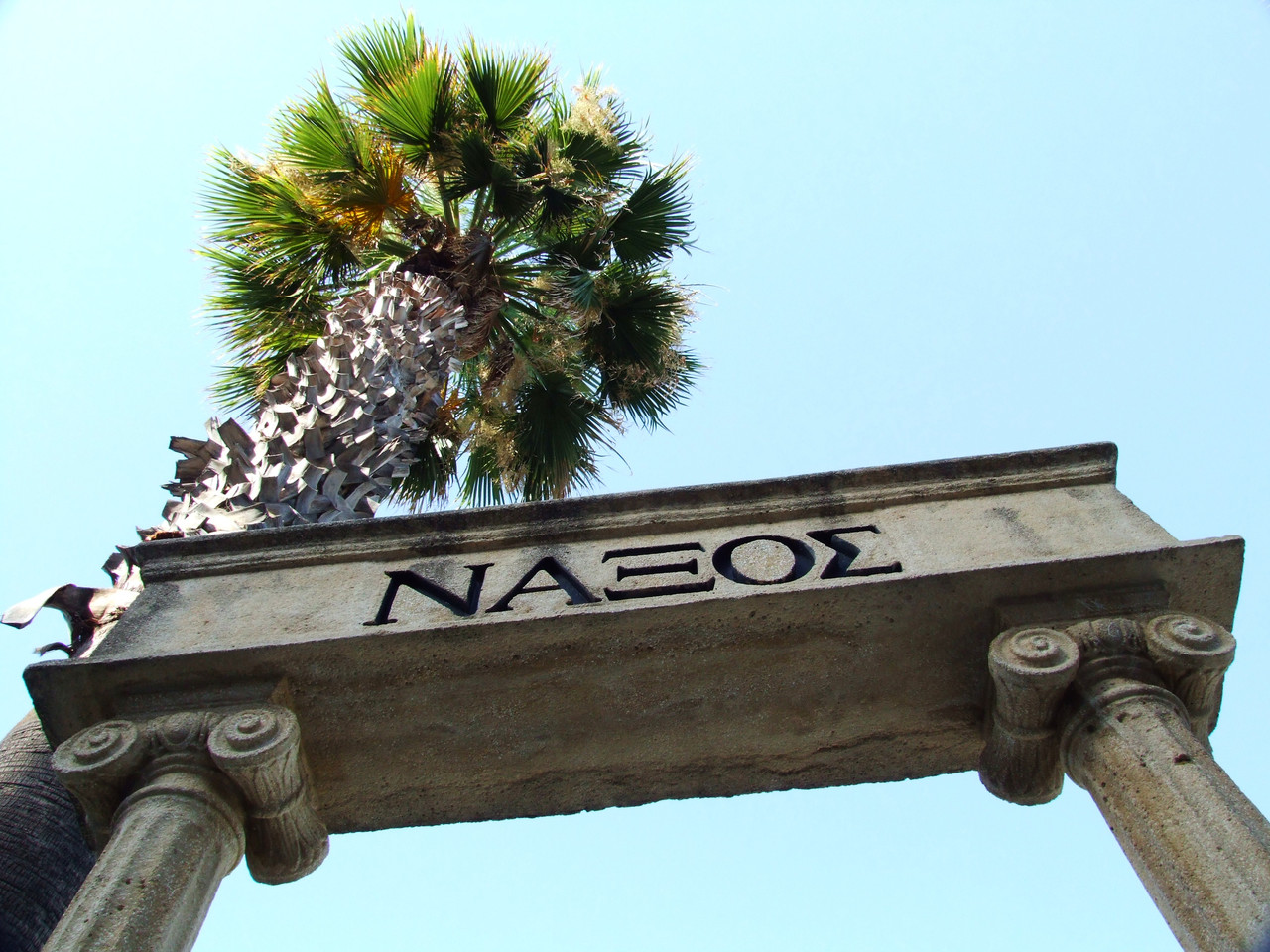 Giardini Naxos, località della costa Ionica messinese, è adagiata a livello del mare all'interno di una baia suggestiva che da Capo Taormina va a Capo Schisò, storica penisoletta di origine vulcanica, territorio di Naxos, il primo insediamento greco in Sicilia. Il nome Giardini Naxos nasce recentemente nel 1978 dall'unione di Giardini e Naxos, proprio a ricordo dell'antica colonia. Oggi è una delle principali destinazioni turistiche italiane grazie alla sua splendida collocazione geografica. È immersa nella natura non distante dalla suggestiva riserva naturale del fiume Alcantara ed è dominata dal maestoso vulcano Etna. Si trova inoltre a soli 5 km dalla bellissima e nota Taormina. Un tempo dedita alla pesca, all'agricoltura e all'artigianato, oggi questa località ha un'economia basata soprattutto sul turismo. L'organizzazione turistica è molto efficiente potendo contare su stabilimenti balneari, ristoranti, bar e migliaia di posti letto sparsi tra i numerosi alberghi Giardini naxos. Senza dubbio è una meta preferita da migliaia di turisti provenienti da tutto il mondo per trascorrere in sicilia vacanze rilassanti e indimenticabili, immersi tra le bellezze della natura e le suggestioni dell antichità qui ancora forti. Giardini Naxos vanta una delle spiagge più belle della costa Ionica e da qui si raggiungono facilmente anche le varie spiagge di Taormina e Letojanni. I resti archeologici di Naxos sono all'interno di un Parco Archeologico che si può percorrere a piedi facendo delle interessanti passeggiate# Annesso si trova anche un Museo. La località è raggiungibile facilmente in aereo, trovandosi a meno di un'ora dall'aeroporto internazionale di Fontanarossa-Catania., oltre che con la linea ferroviaria e in auto percorrendo l'autostrada A 18 da Catania e Messina.